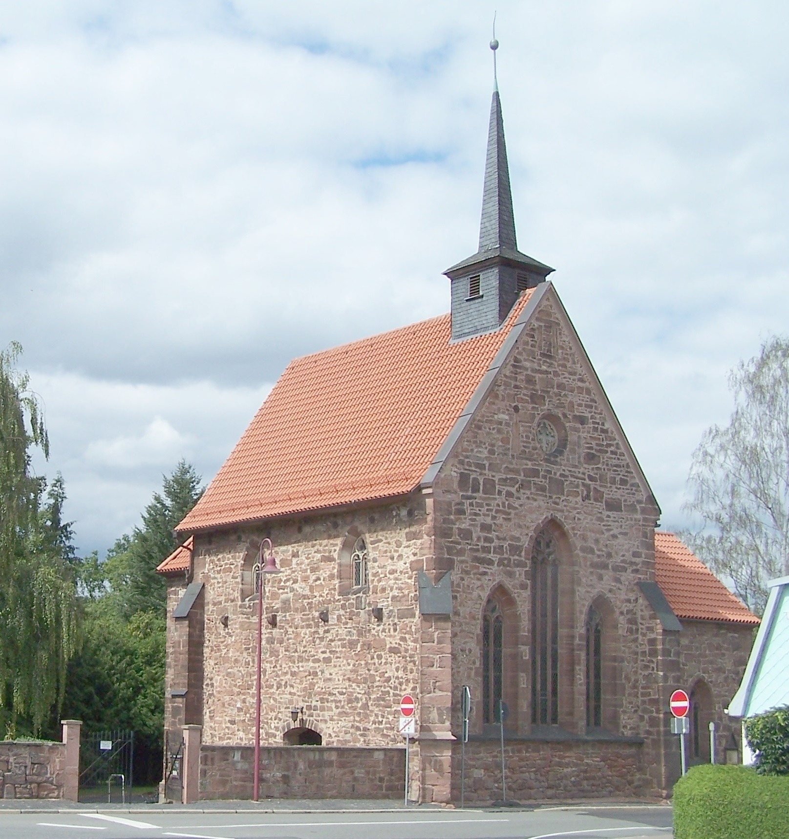 Vacha, Friedhofskirche, Rest der ehemaligen Servitenkirche